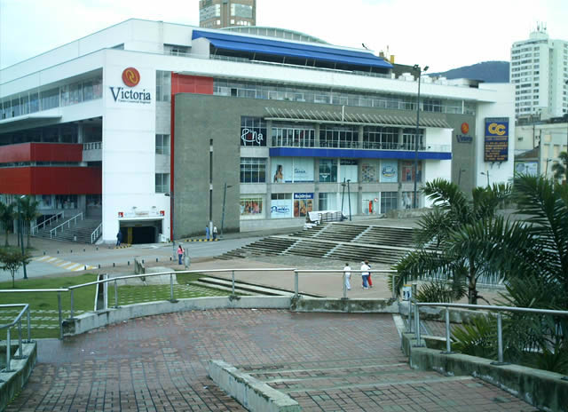 Ciudad Victoria, Pereira, Colombia